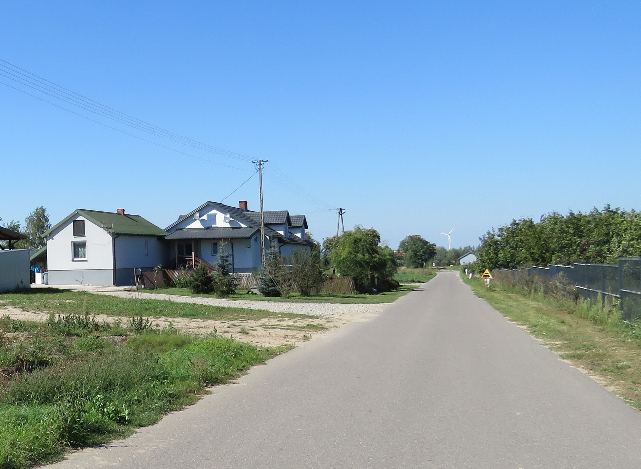 Raźniewo